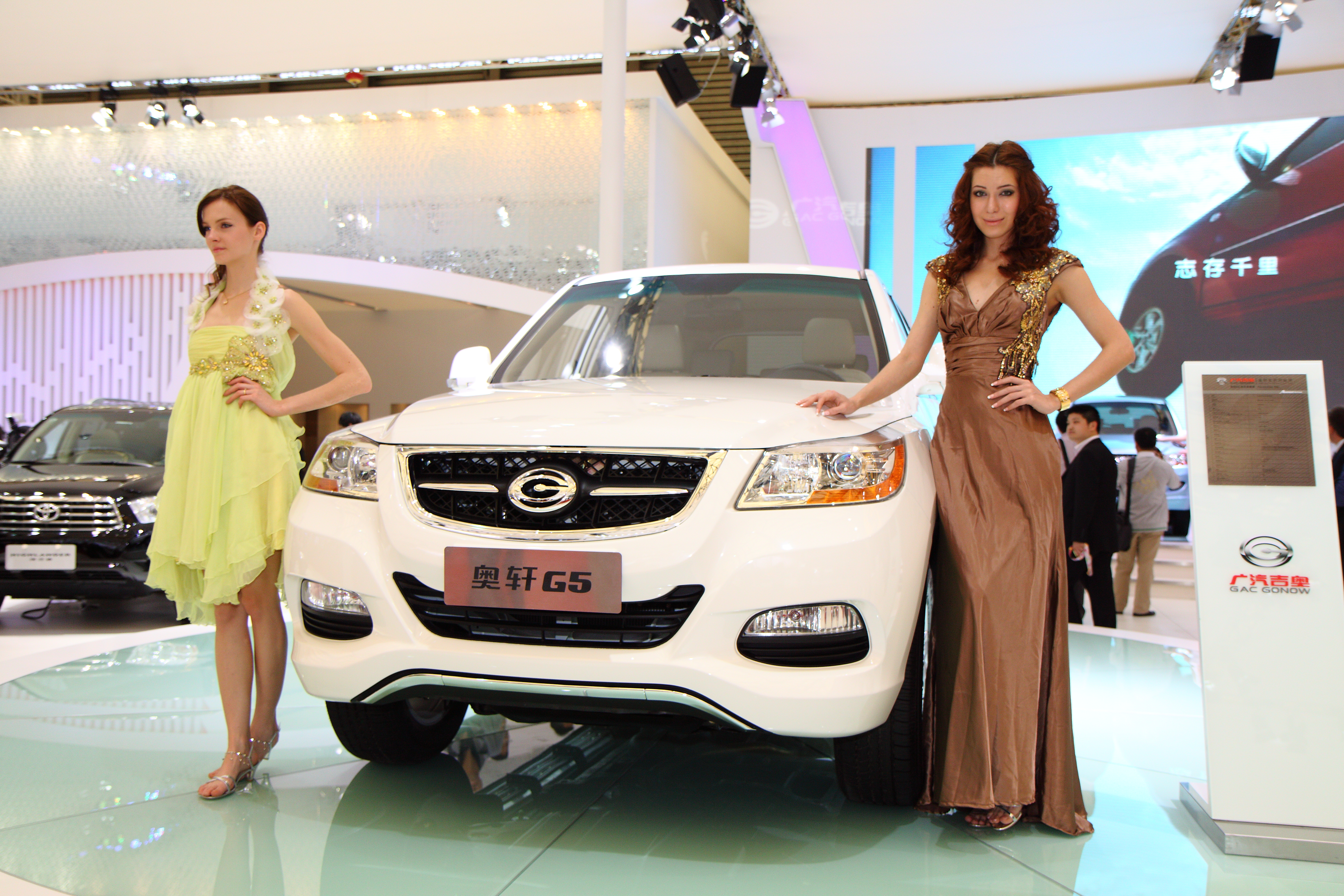 DPP_0800